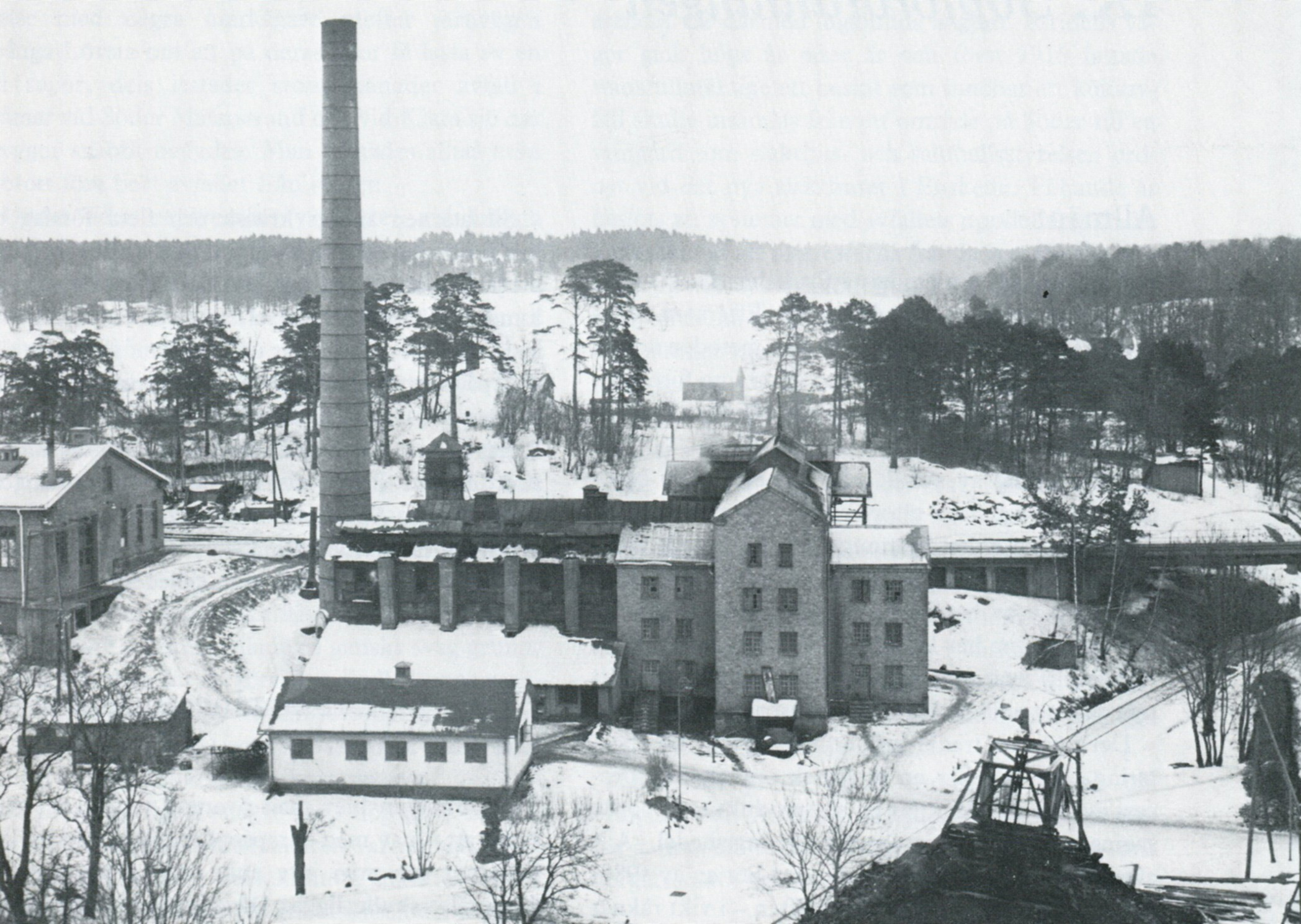 Lövsta första sopförbränningsanläggning